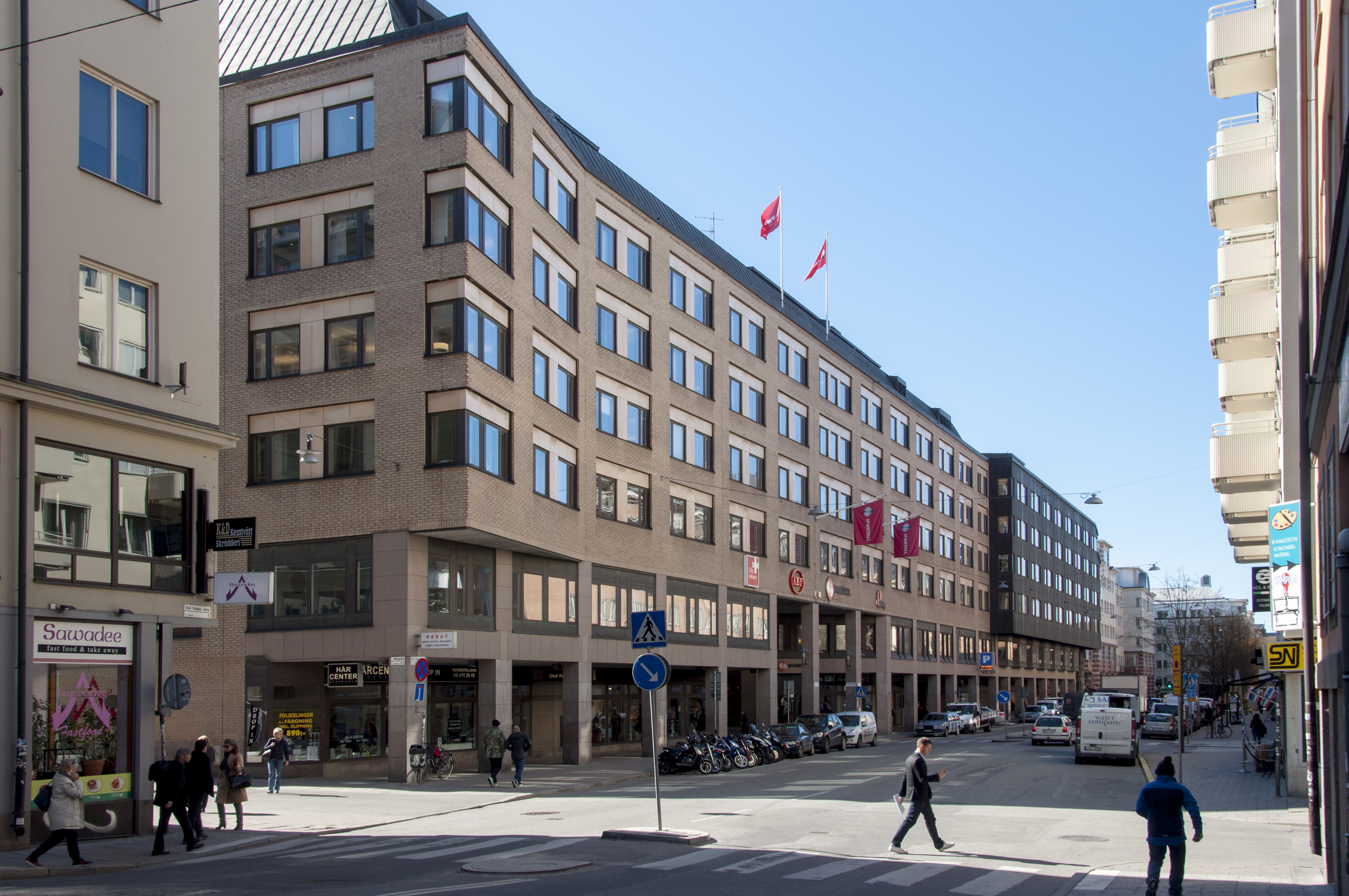 Förbundshuset, Svärdfisken 13, Olof Palmes gata 9-13, Nybyggnadsår 1979 - 1983, AOS, Ahlgren Olsson Silow Arkitetkkontor AB (Arkitektkontor) BPA Byggproduktion AB (Entreprenör) Fastighetsbolaget Svärdfisken, Metall- och Fabriks Handelsbolag (Byggherre)